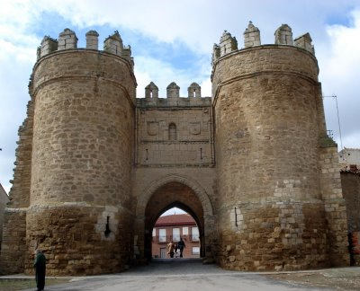 Puerta de San Andrés